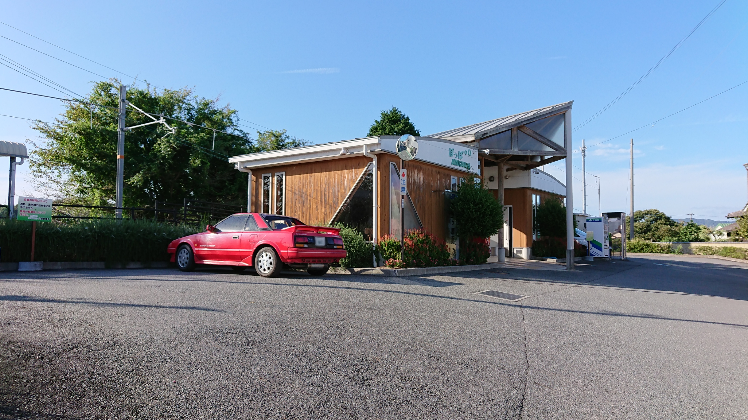 JR西日本・加古川線の青野ヶ原駅駅舎